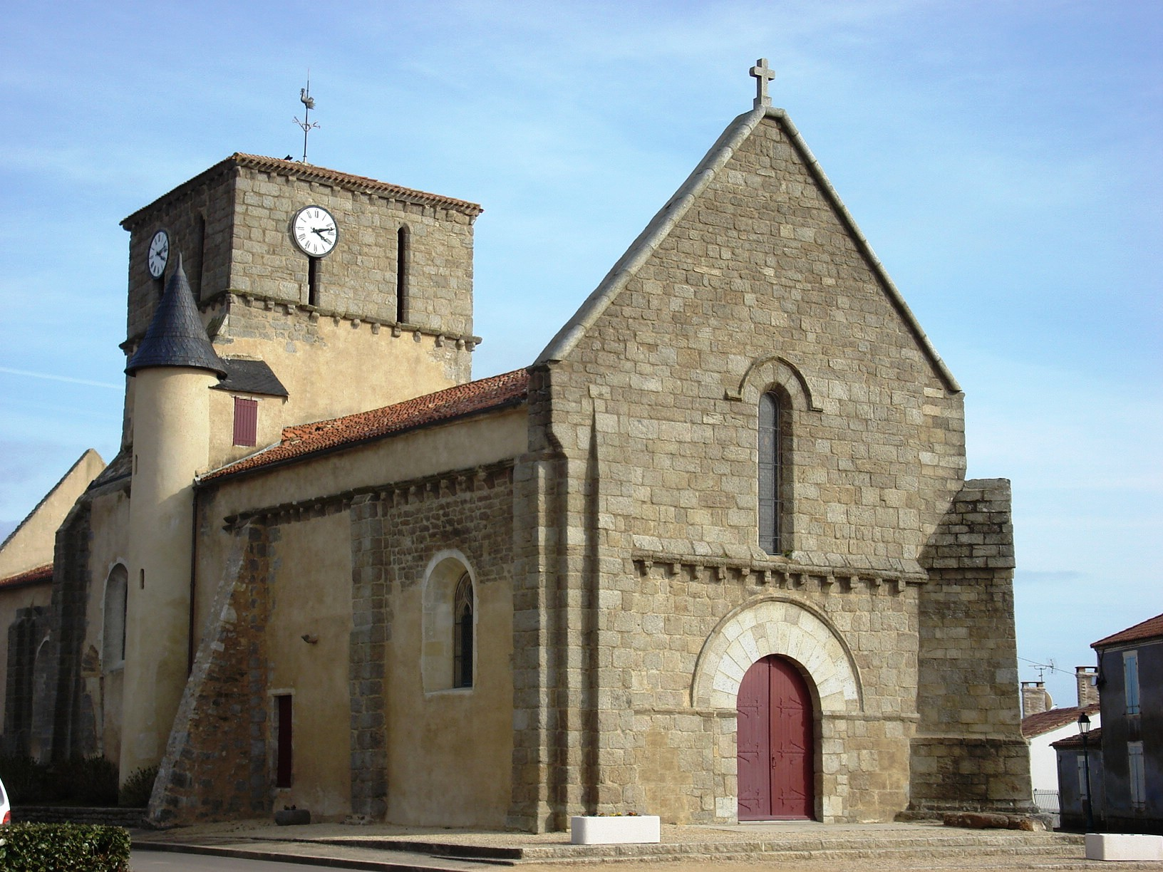 Église Saint-Martin-de-Tours du Bernard, (Inscrit, 1927) .